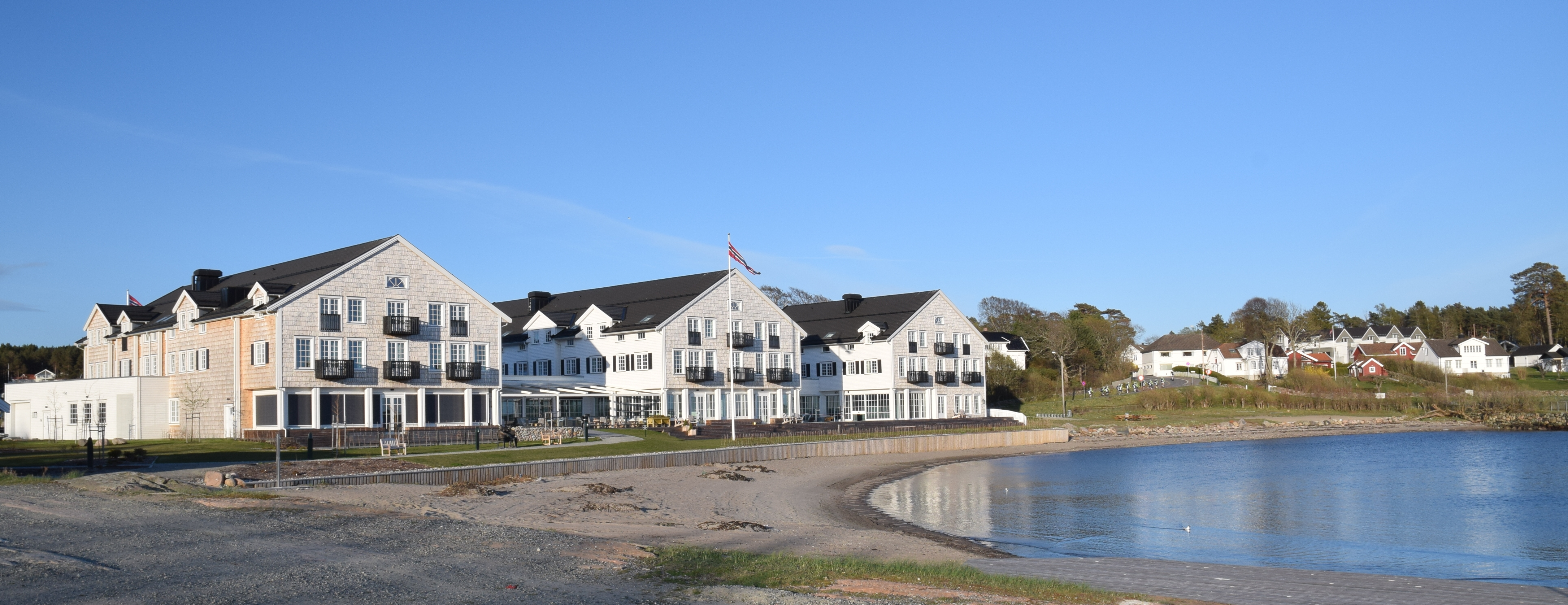 Støtvig Hotel, Larkollen, Rygge kommune